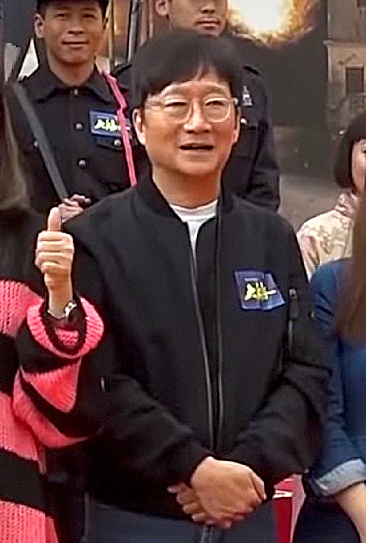 中文（香港）: 《大帥哥》「帥氣登場」活動